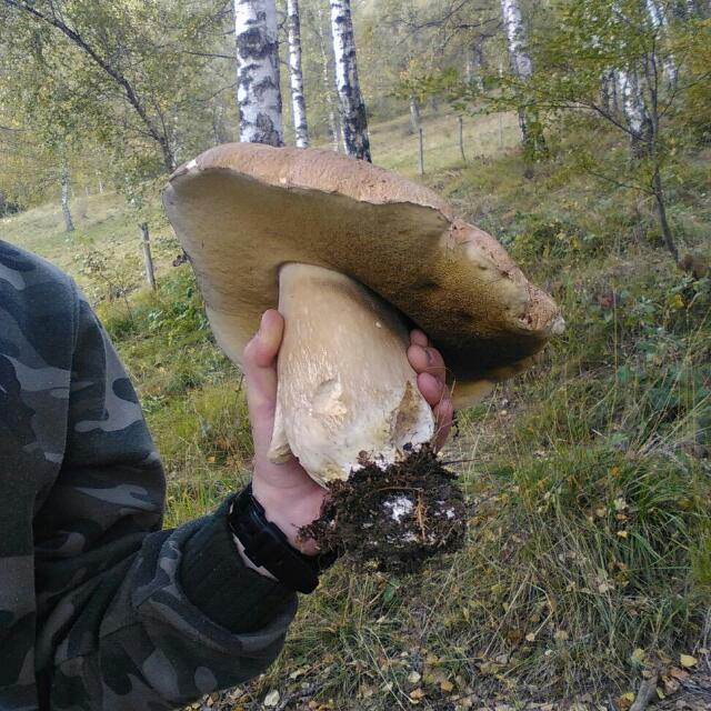 Un fungo di Bedulita